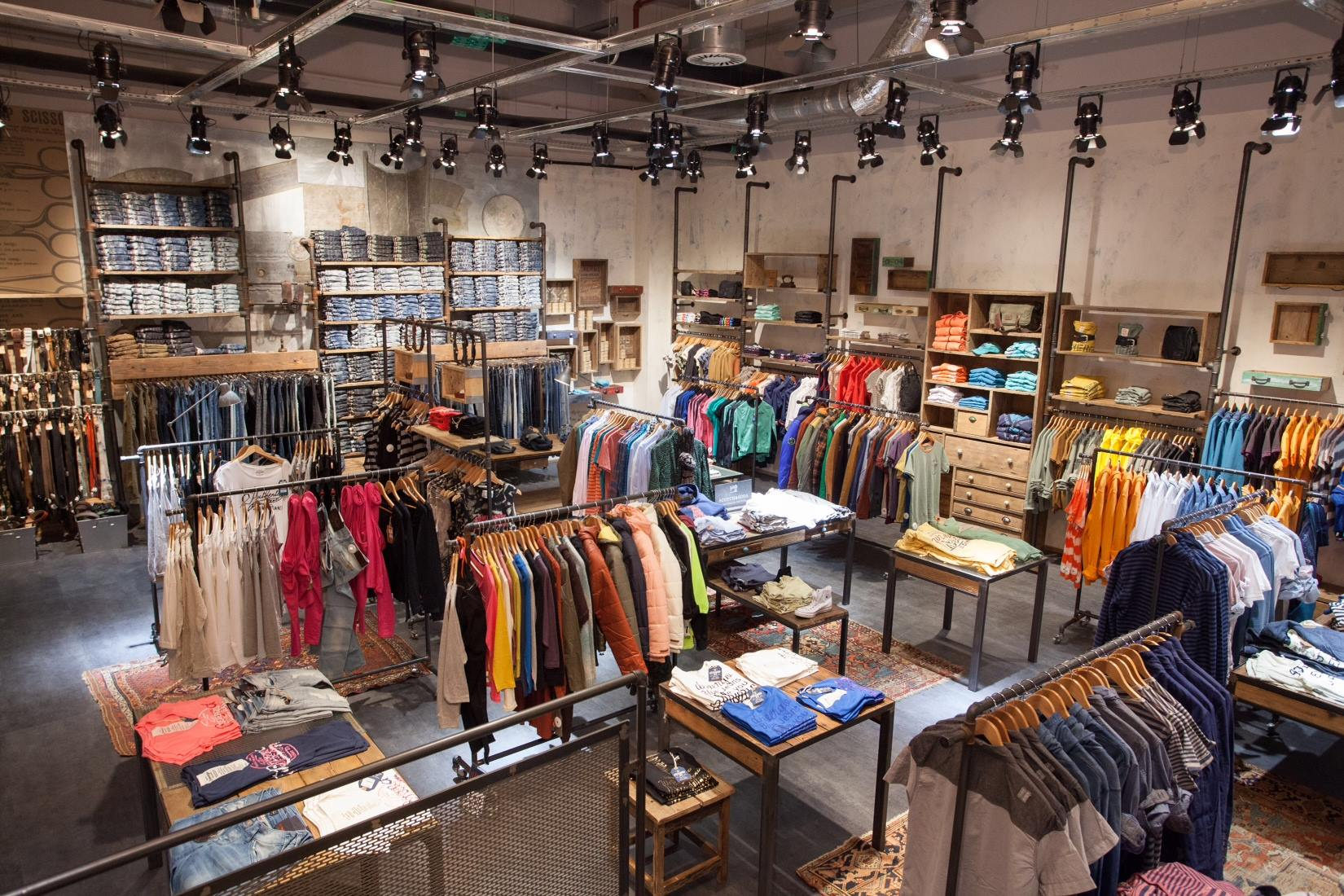 Új arculat.